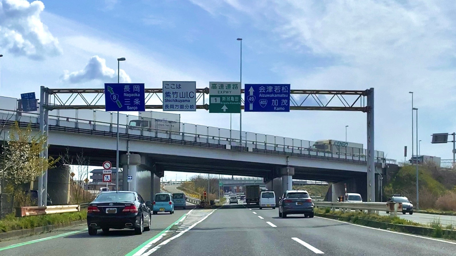 栗の木バイパス側から見た紫竹山IC 長岡方面分岐（2020年4月）